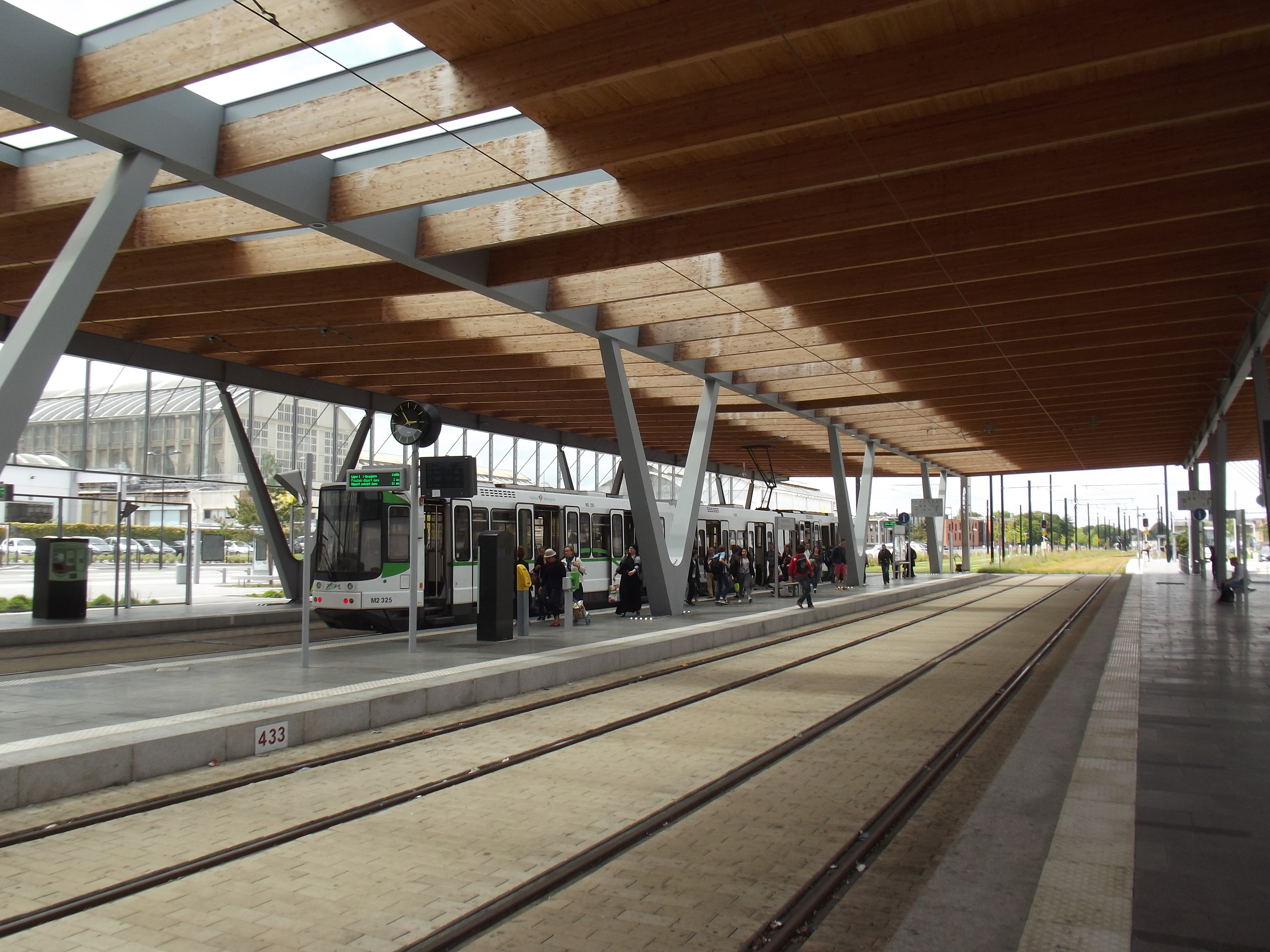 Nieuwe tram/tramtrein overstap halte in Nantes